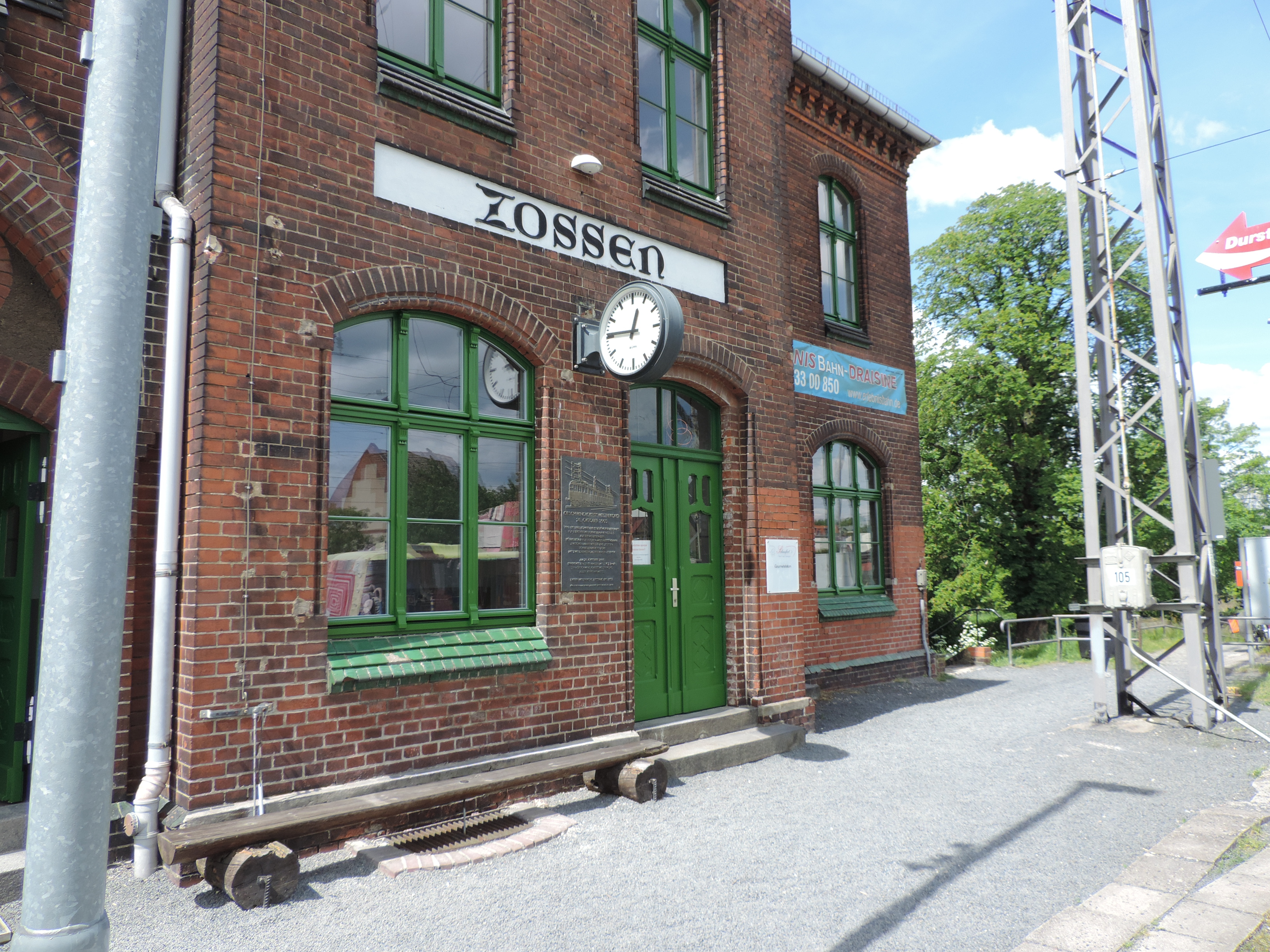 Bahnhof Zossen - Bahngebäude Erlebnisbahn